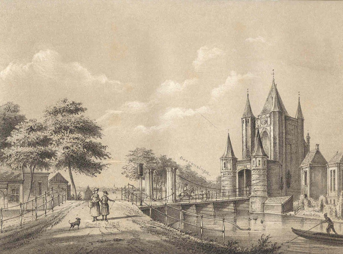 This image was taken from a book from 1874 (Dutch copyright expires after 70 years of author's death). Source: Geschiedenis en beschrijving van Haarlem, van de vroegste tijden tot op onze dagen, F. Allan, J. J. van Brederode, Haarlem 1874 Text on the page: "De Spaarwouder of Amsterdamschepoort te Haarlem, naar een teekening van J.E. La Farge in de vorige eeuw vervaardigd".